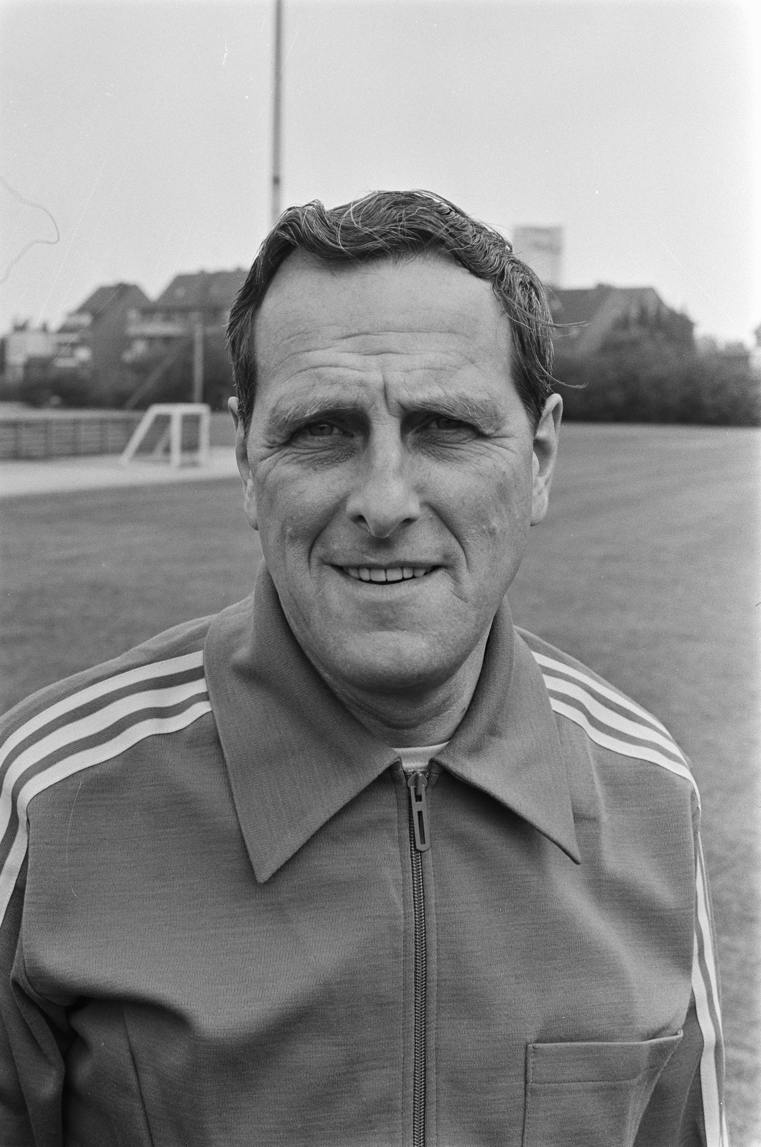 Collectie / Archief : Fotocollectie Anefo Reportage / Serie : [ onbekend ] Beschrijving : Selectie Zweedse elftal voor WK voetbal in trainingskamp in Mönchen Gladblach; trainer Ericsson, kop Datum : 11 juni 1974 Trefwoorden : sport, trainers, voetbal Fotograaf : Verhoeff, Bert / Anefo, [onbekend] Auteursrechthebbende : Nationaal Archief Materiaalsoort : Negatief (zwart/wit) Nummer archiefinventaris : bekijk toegang 2.24.01.05 Bestanddeelnummer : 927-2494